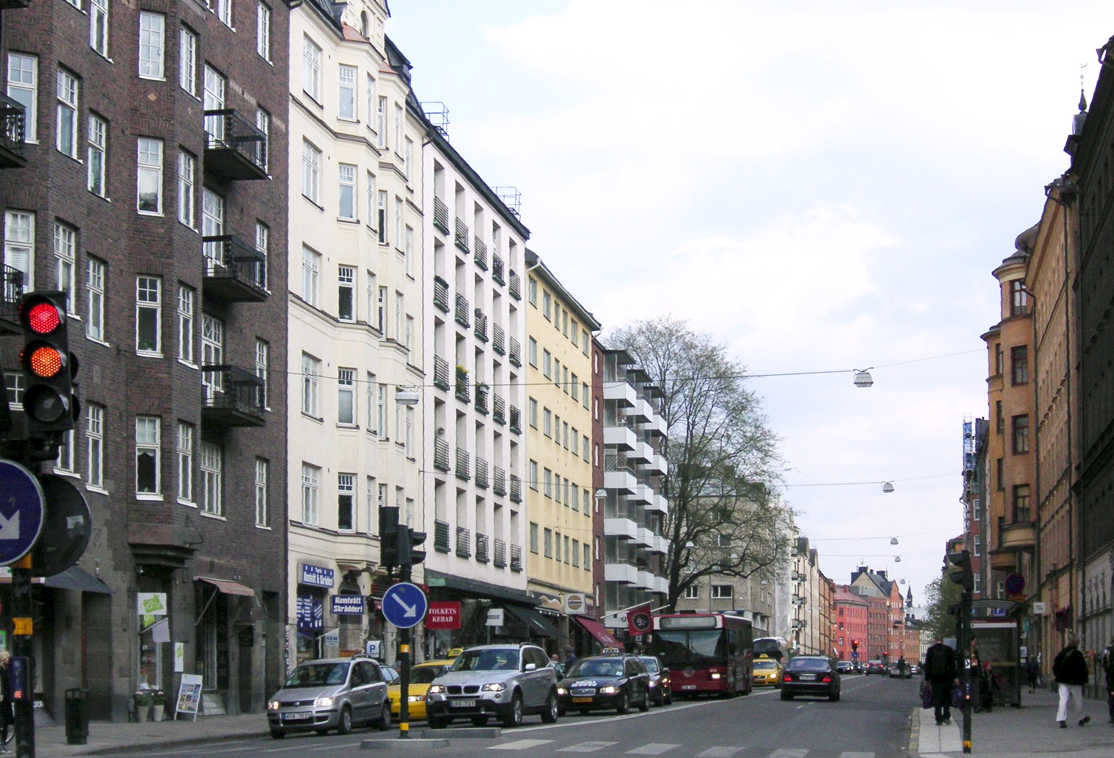 Folkungagatan i Stockholm, vy mot öst.